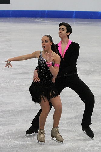 Софиа Сфорца и Францеско Фиоретти (Италия) на чемпионате мира по фигурному катанию среди юниоров 2012